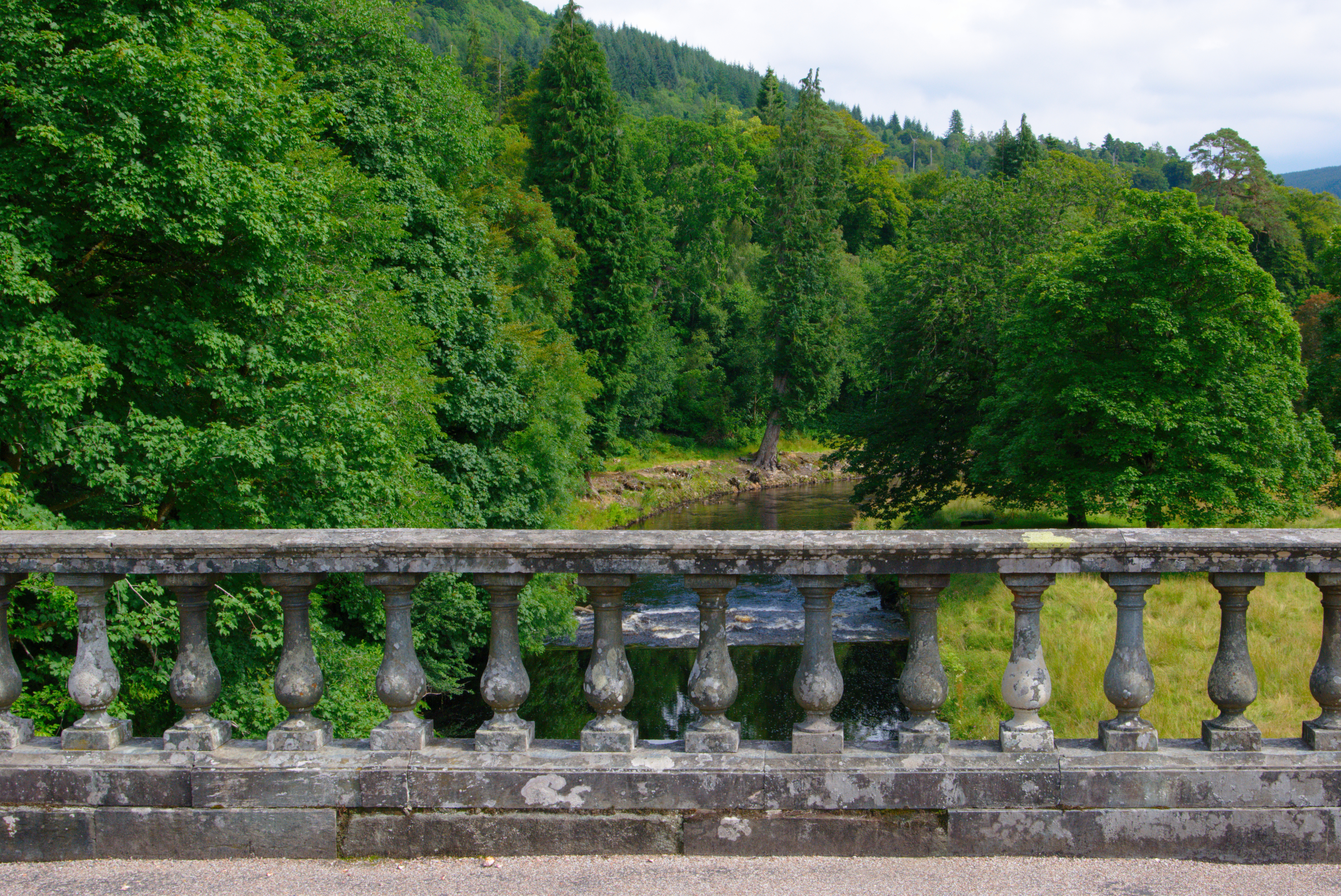 Brücke über den Aray am Fuße des Dun na Cuaiche, bei Inveraray, Schottland